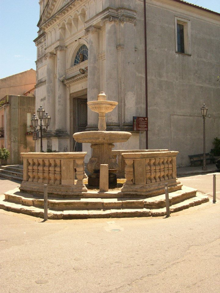 Fontana Barocca: realizzata in stile barocco nel XVII secolo per volere del sindaco dell'epoca Carlo Pacino. L'opera si trova in piazza Vittorio Emanuele II accanto alla Chiesa di San Rocco